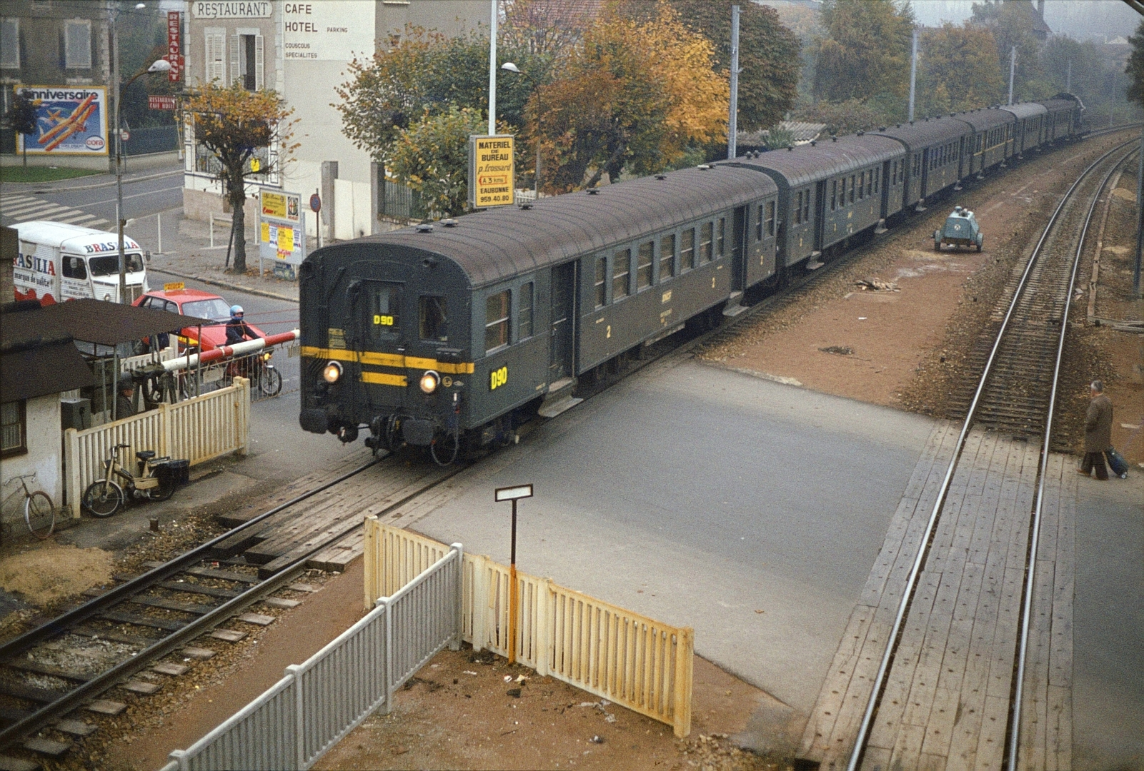 Une rame Talbot venant d'Argenteuil franchit l'ancien passage à niveau de Sannois le 13/11/1982.